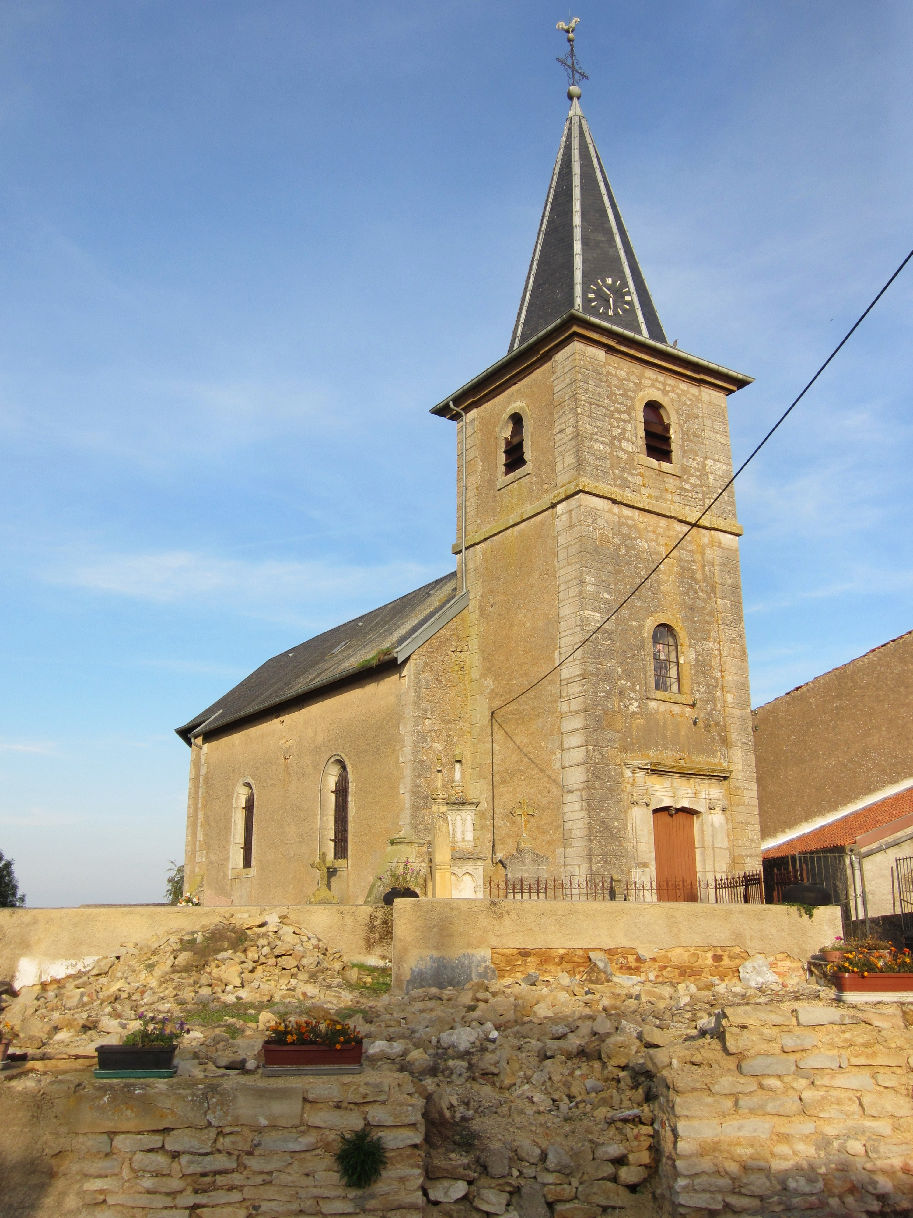 Description Église paroissiale Saint Hilaire à Allamont Date25 September 2011Sourcemon appareil photoAuthorAimelaimePermission (Reusing this file) Église paroissiale Saint Hilaire à Allamont